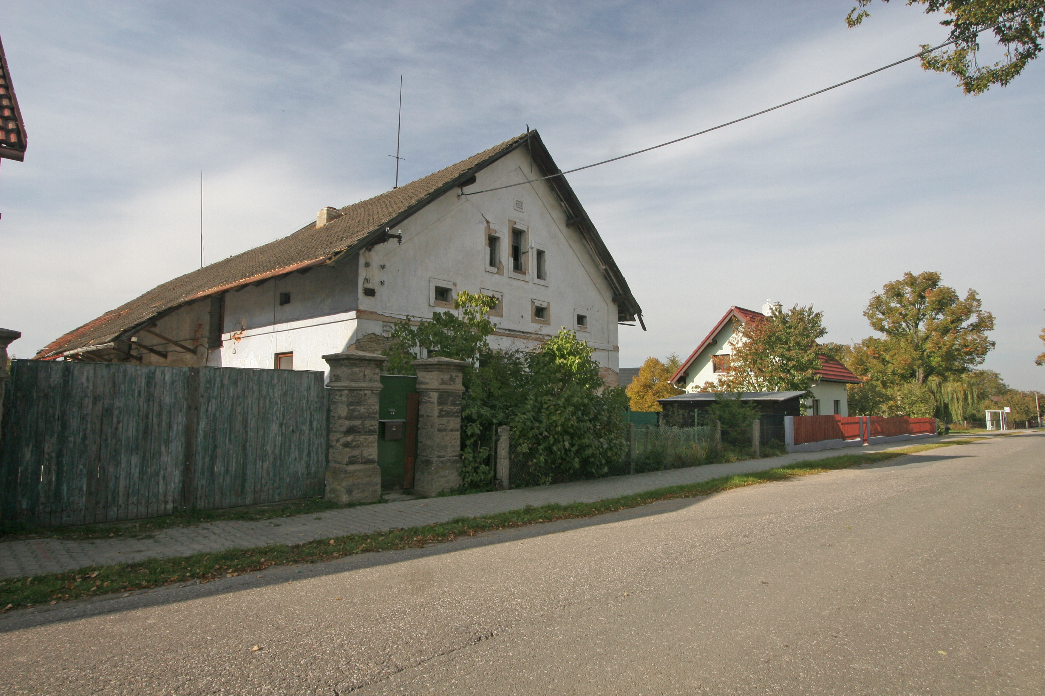 Divec čp. 19